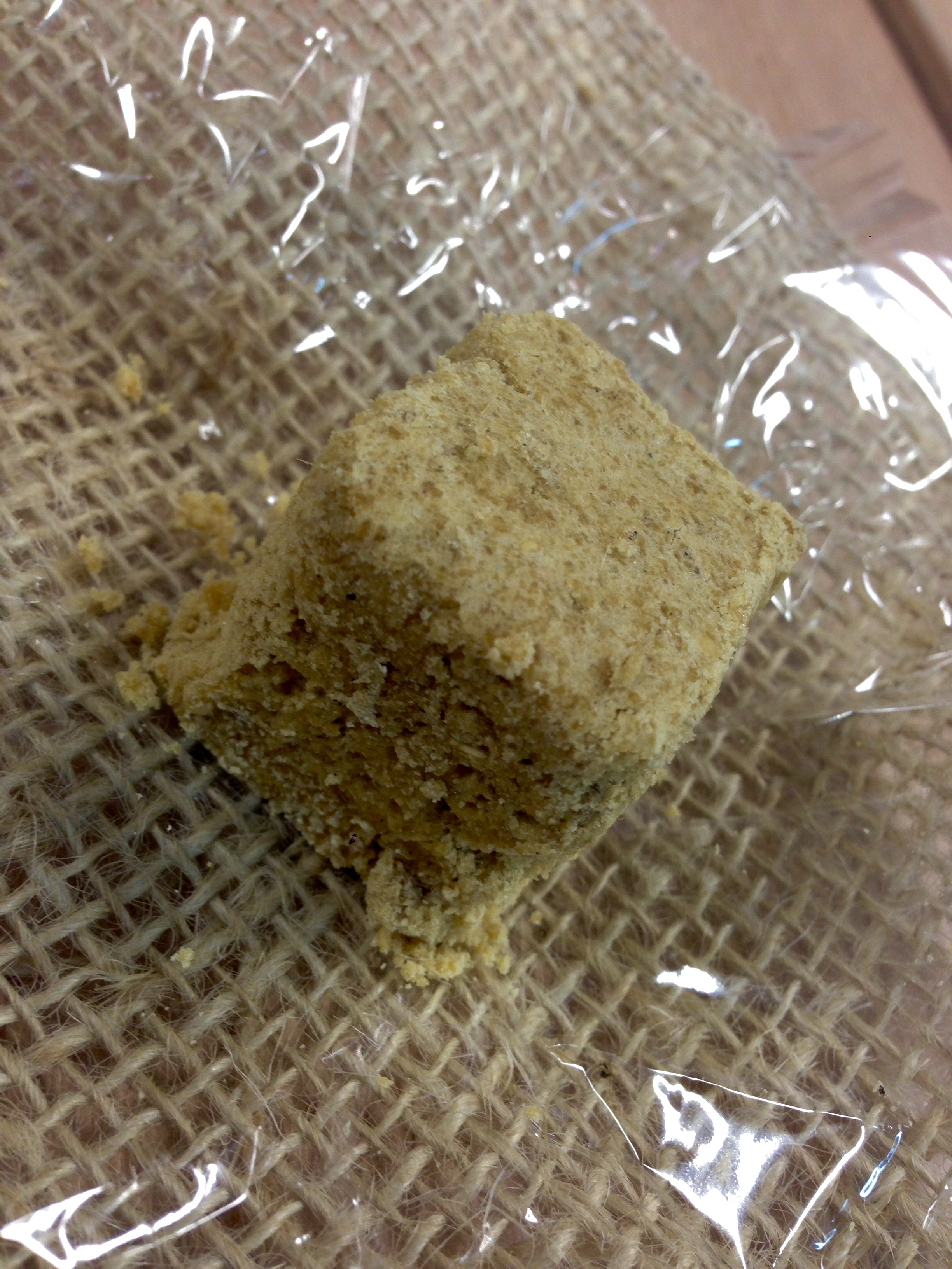 Taiada Cortada